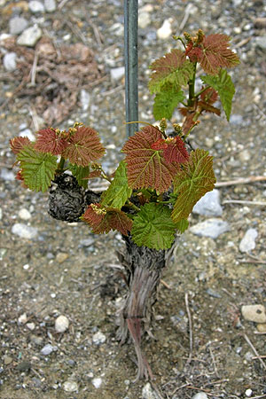 Treibender Rebstock (Fendant)